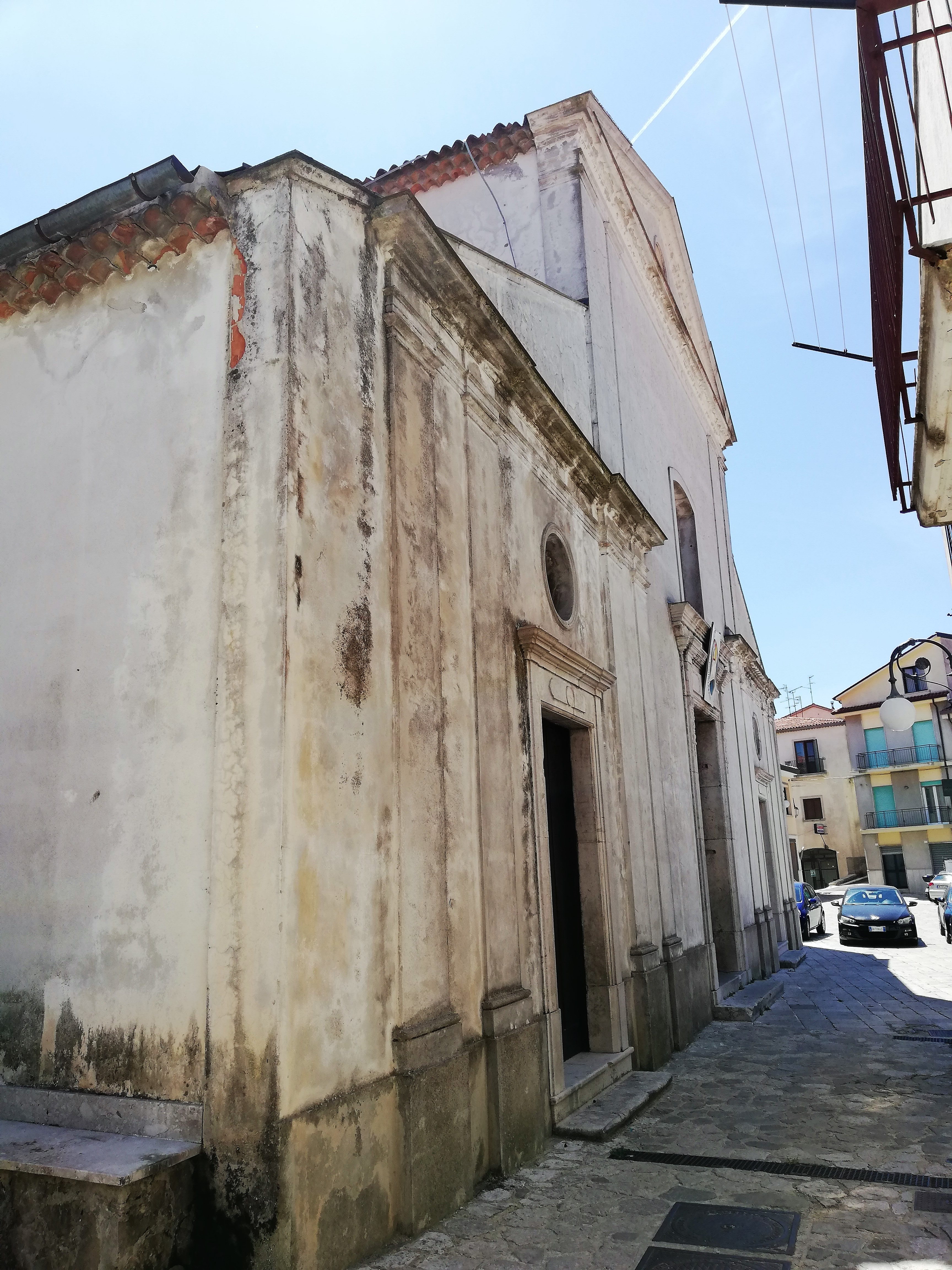 Facciata.